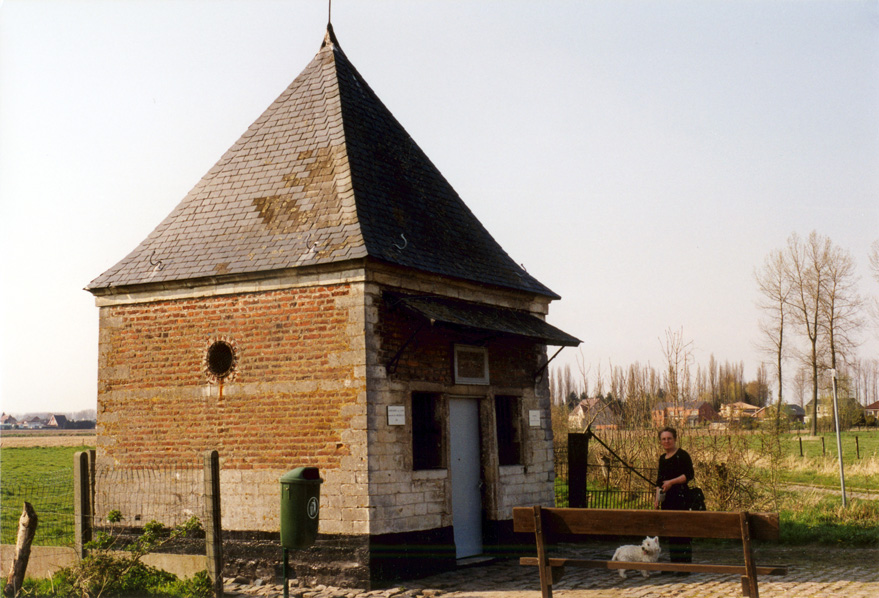 Bethania chapel in Zoutleeuw (Belgium)